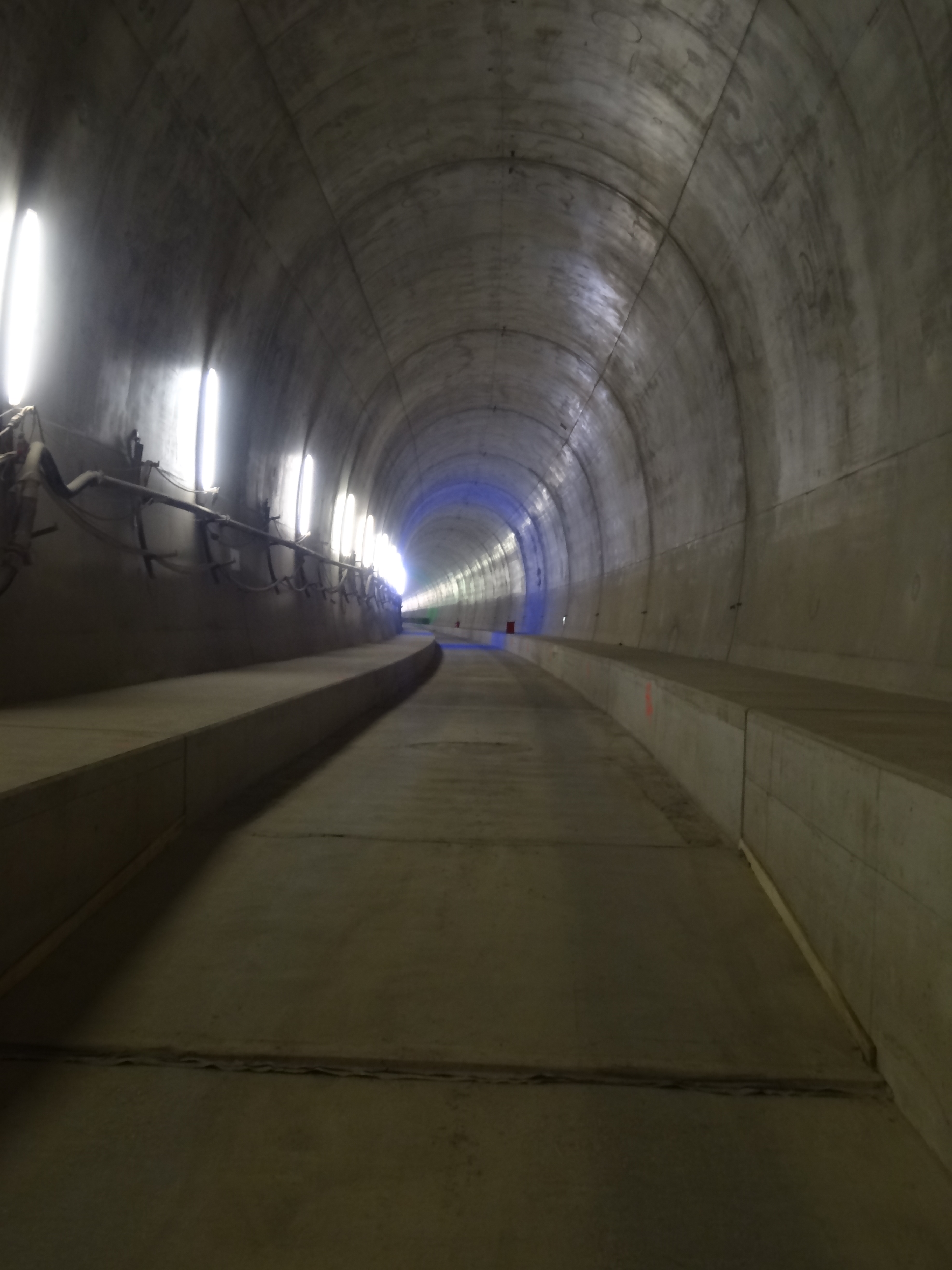 Albabstiegstunnel Portal Ulm am Tag der offenen Baustelle